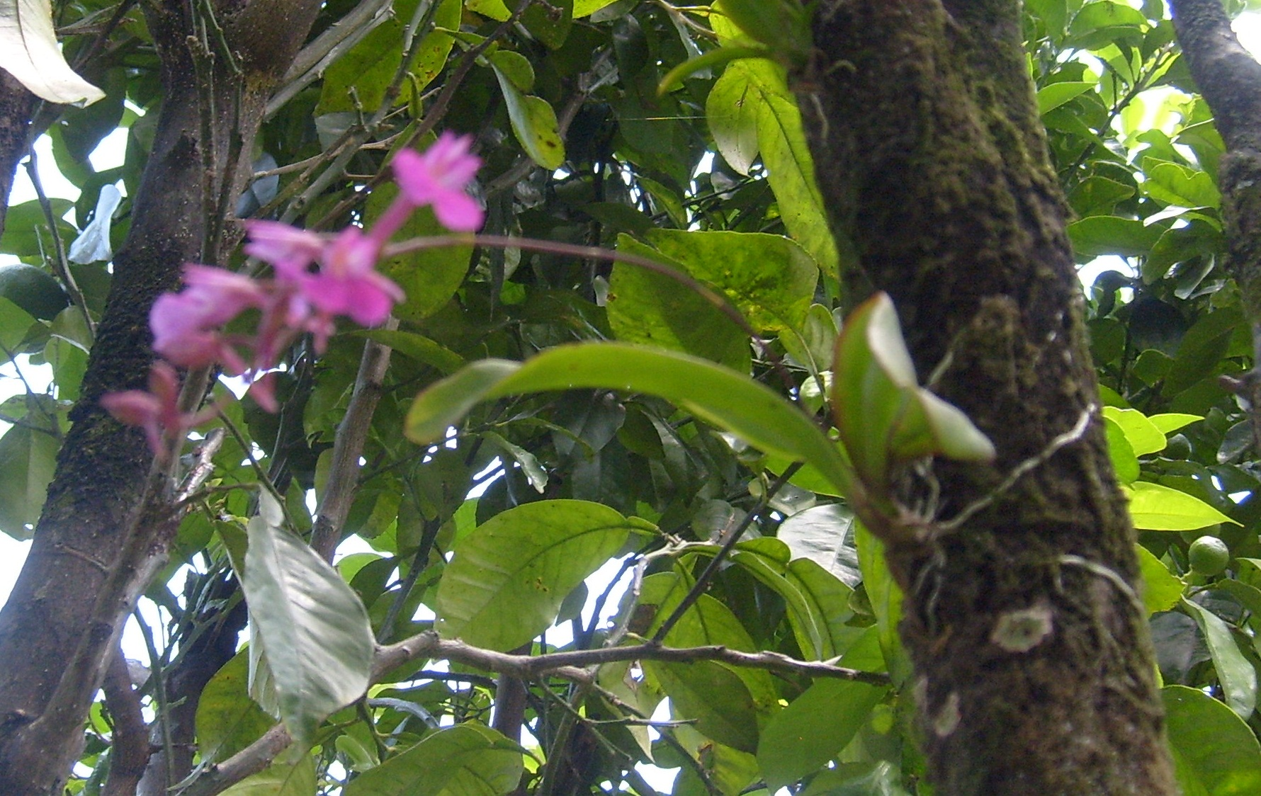 Acá podemos ver una Llovizna Magenta en flor.